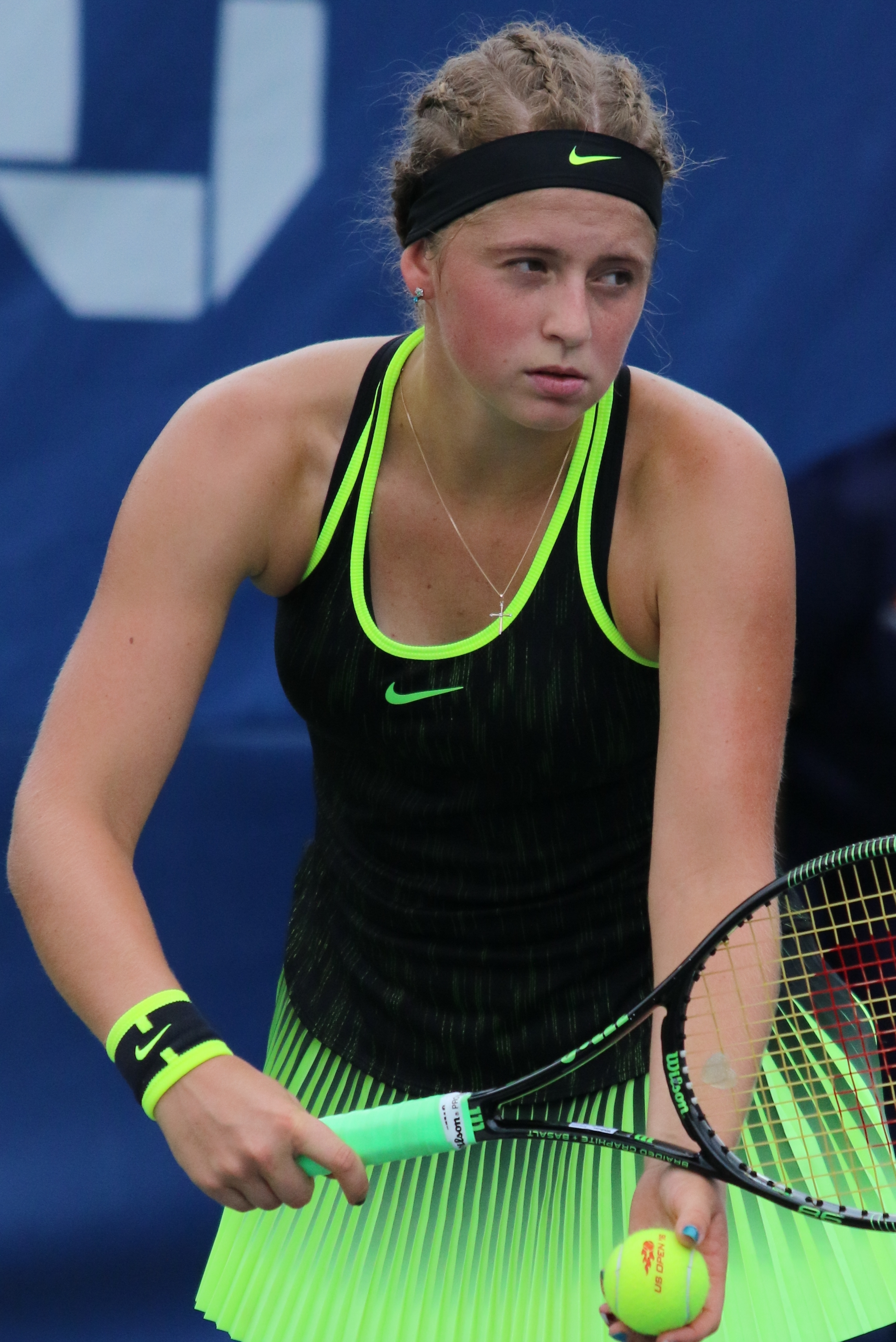 Ostapenko US16 (35)